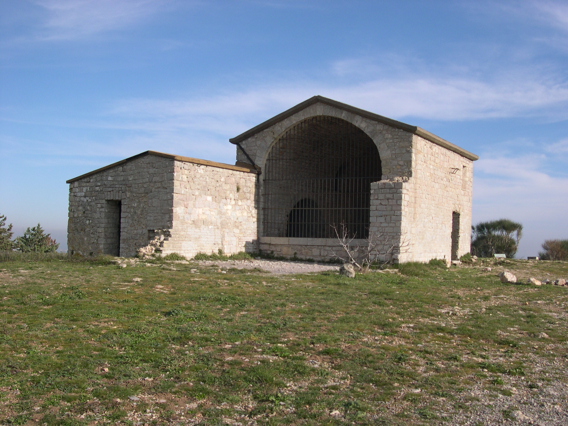 Fabrègues (Hérault) - chapelle Saint-Baudile sur la Gardiole.